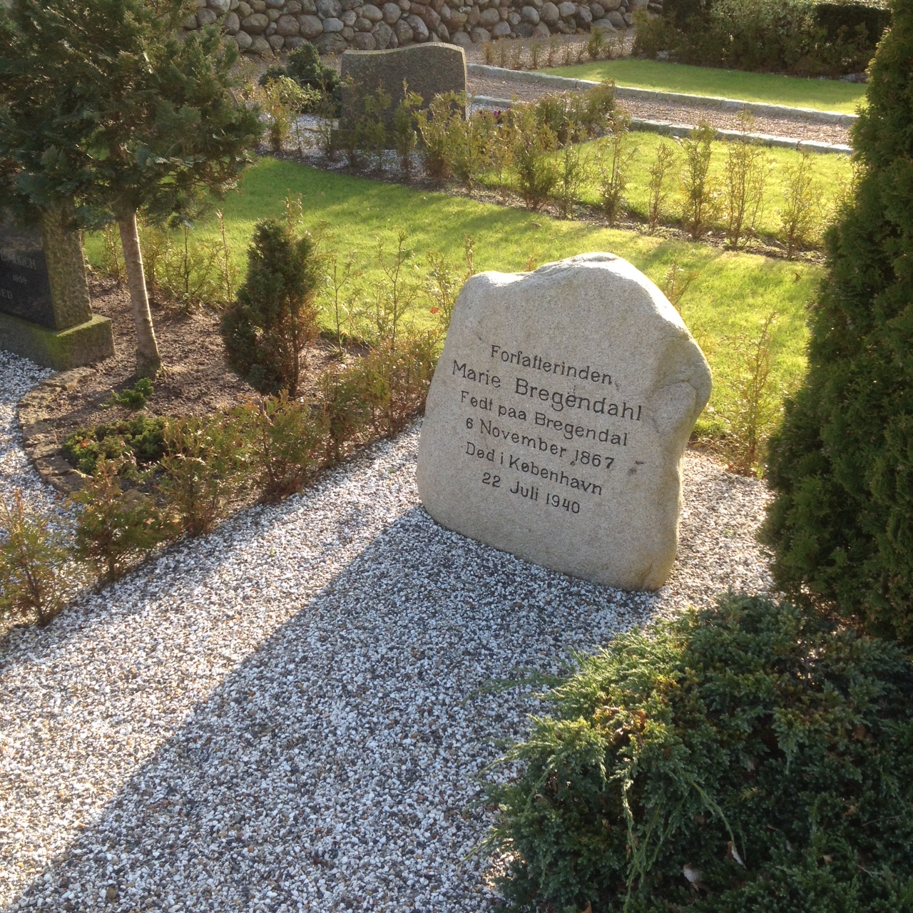 Gravsten - Marie Bregendahl